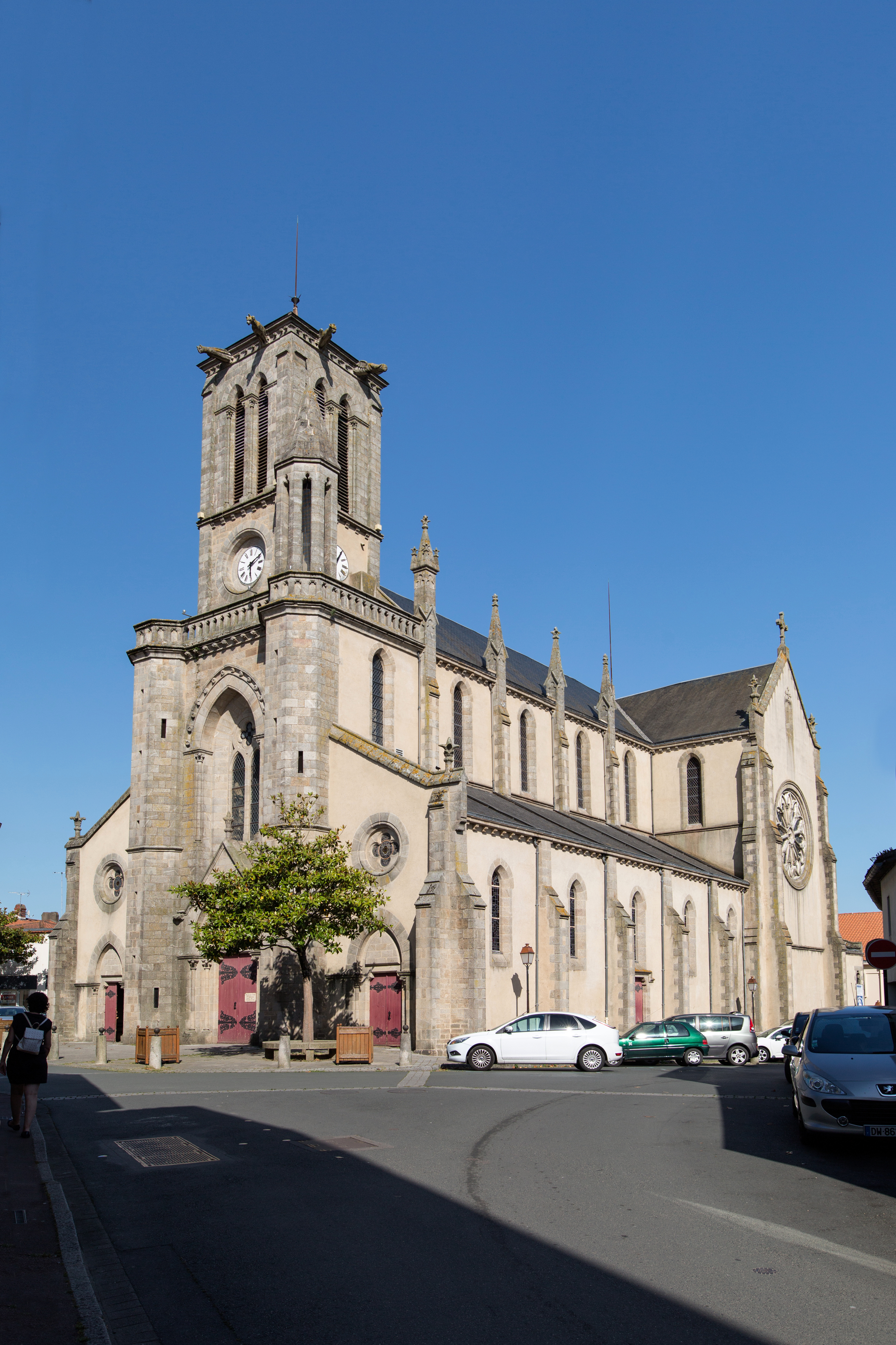 Église